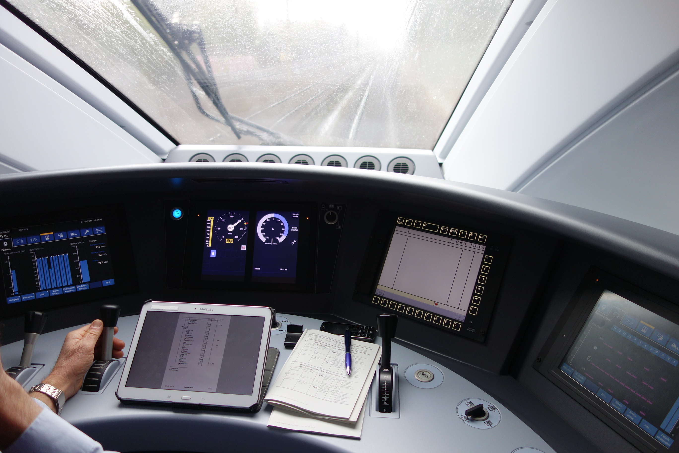 ICE 4 der Deutschen Bahn (Baureihe 412), Führerstand